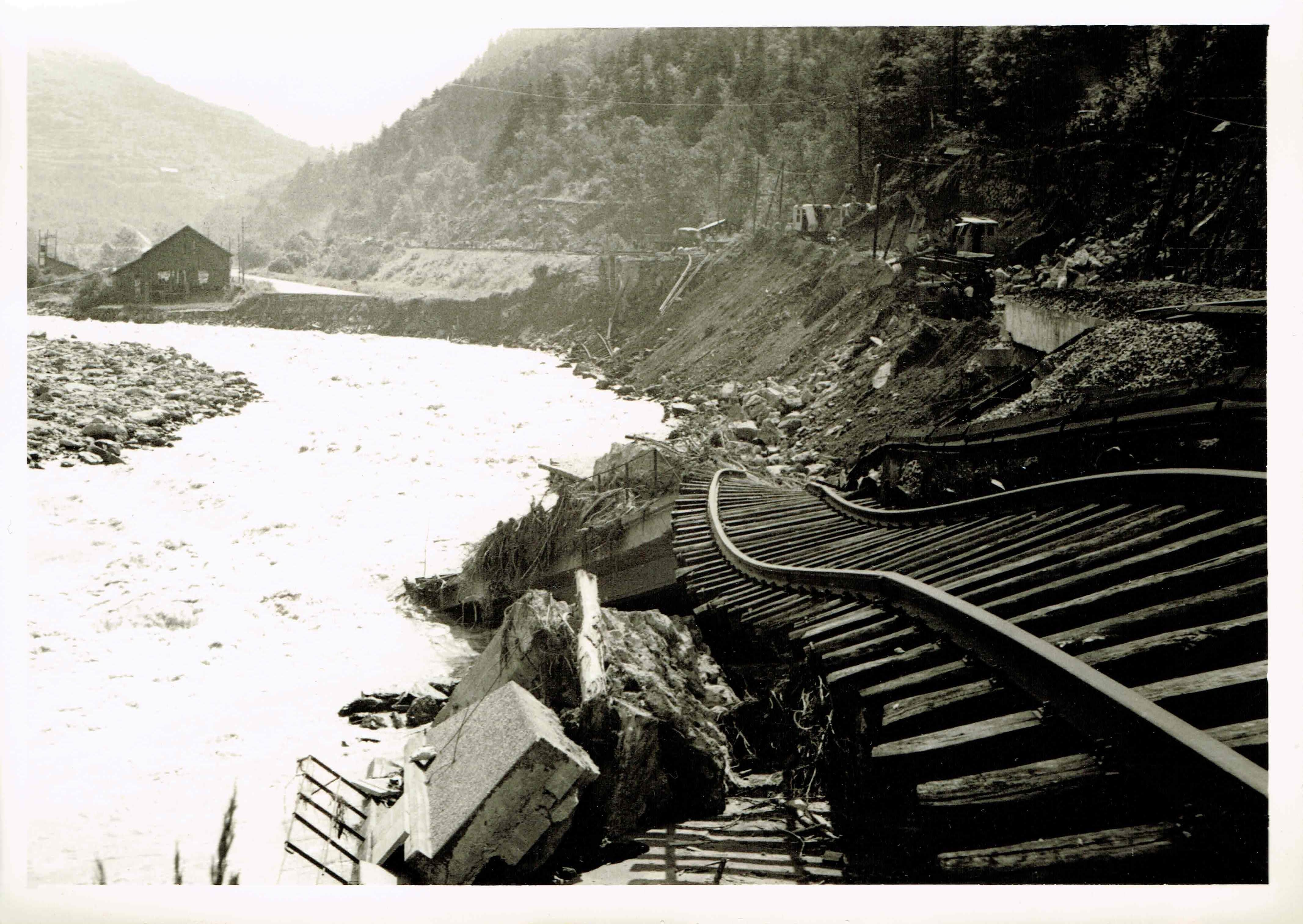 Cette photo montre la voie SNCF après la crue de l'arc en 1957, photo prise au dessus de Saint Michel de Maurienne.